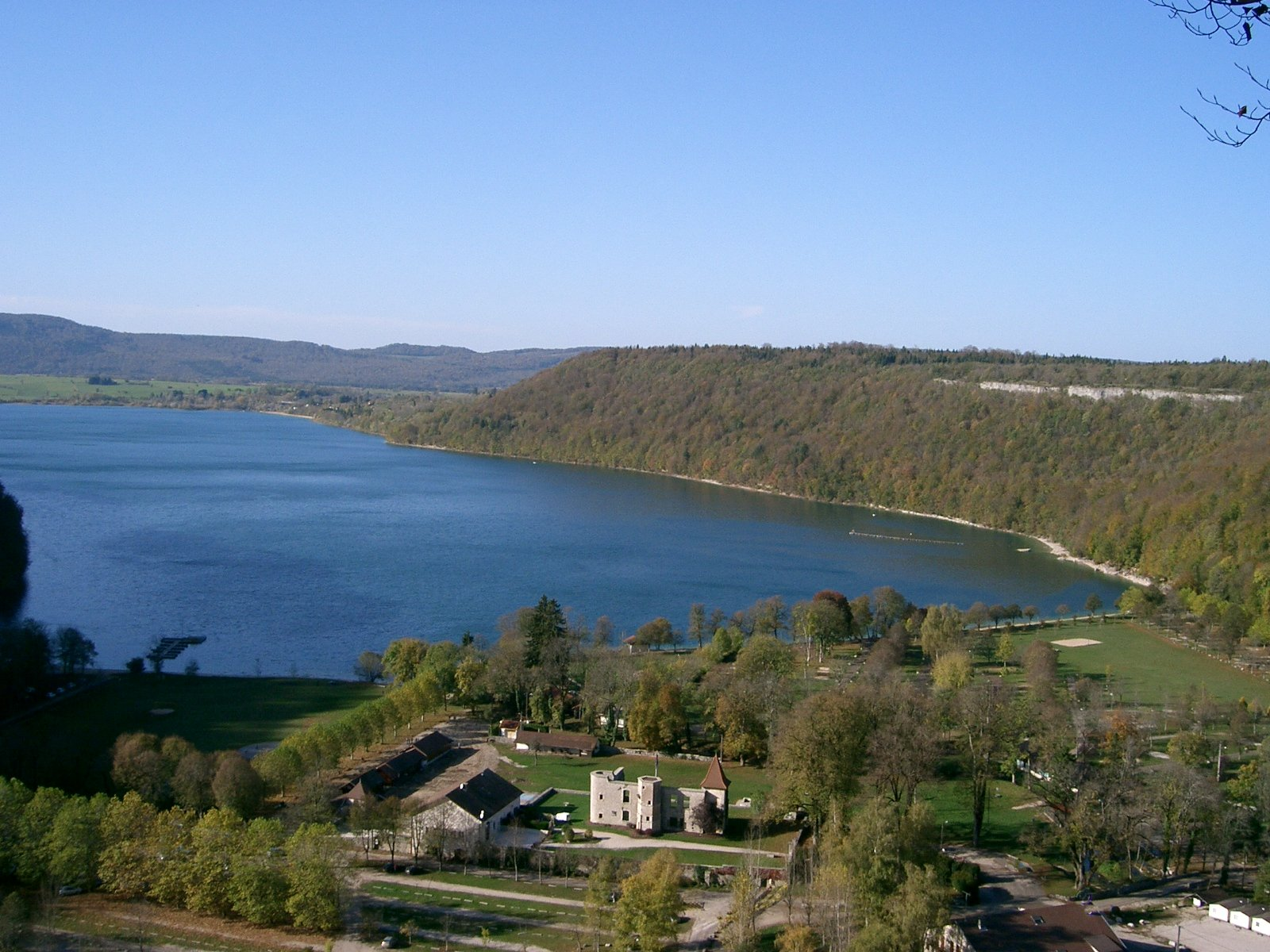 lac de Chalain en automne depuis Fontenu - Jura 39